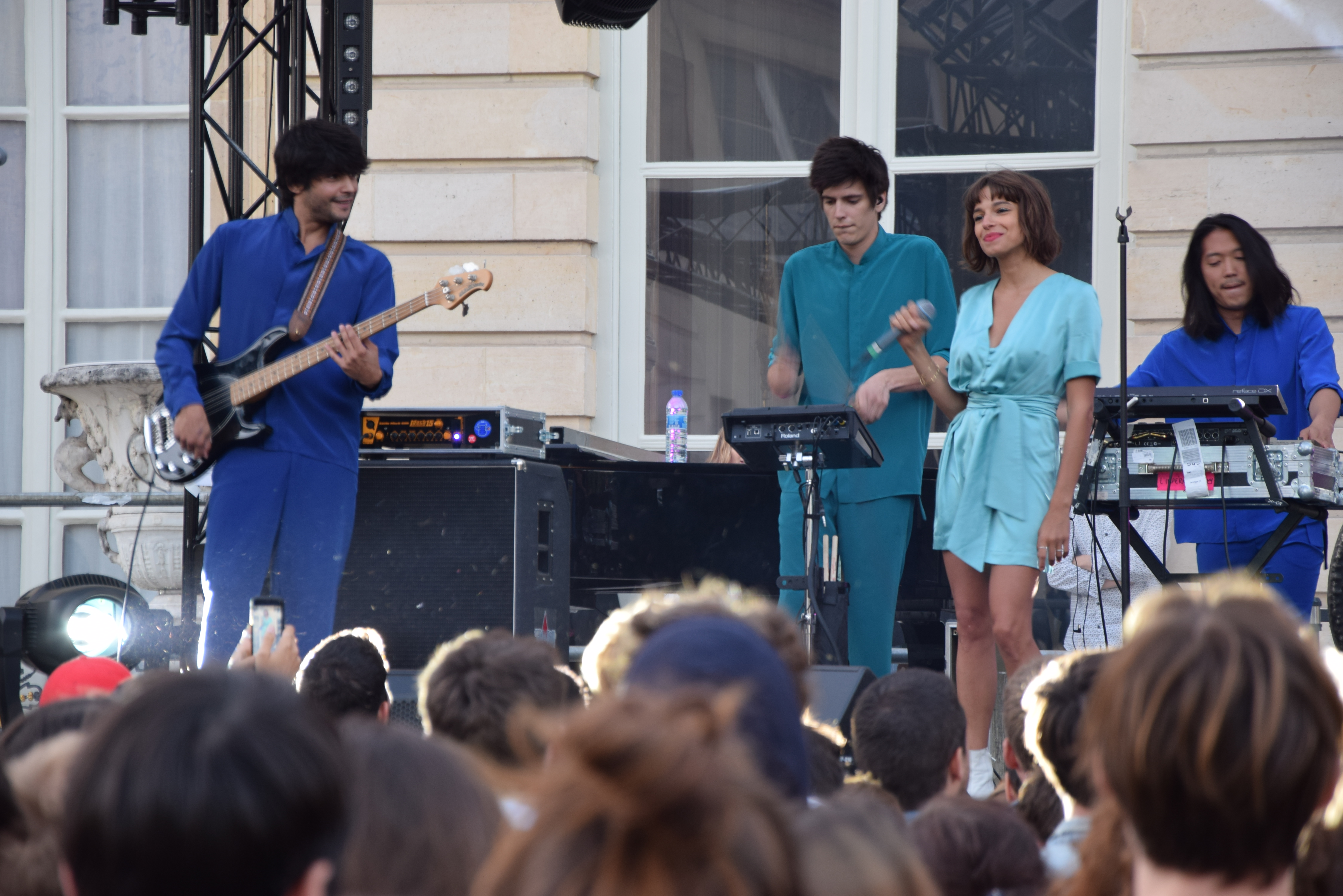 Groupe L'Impératrice devant l'hôtel de Lassay à l'occasion de la fête de la musique le 21 juin 2018